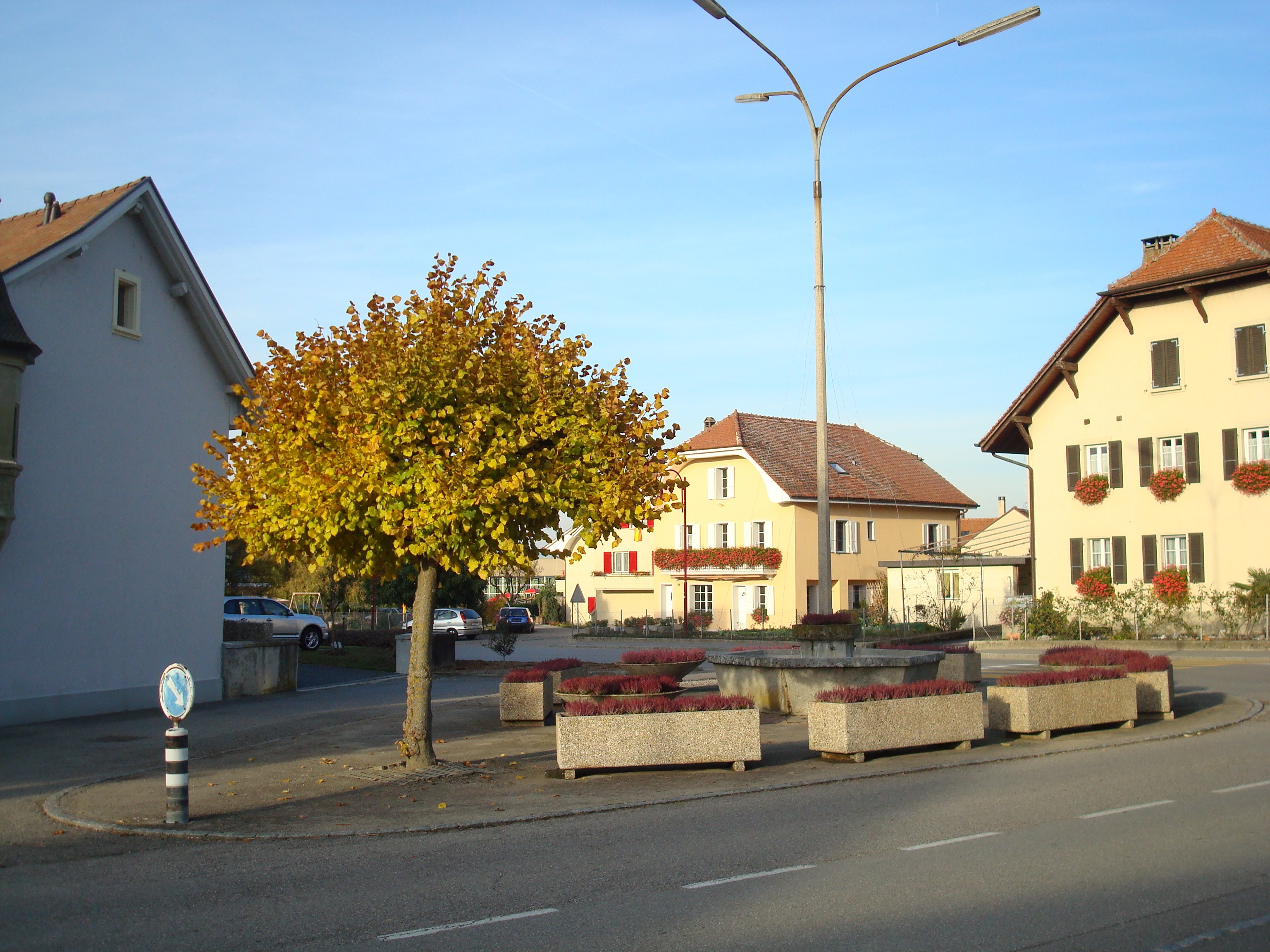 A quelques pas de l'église et des écoles, la place du Château